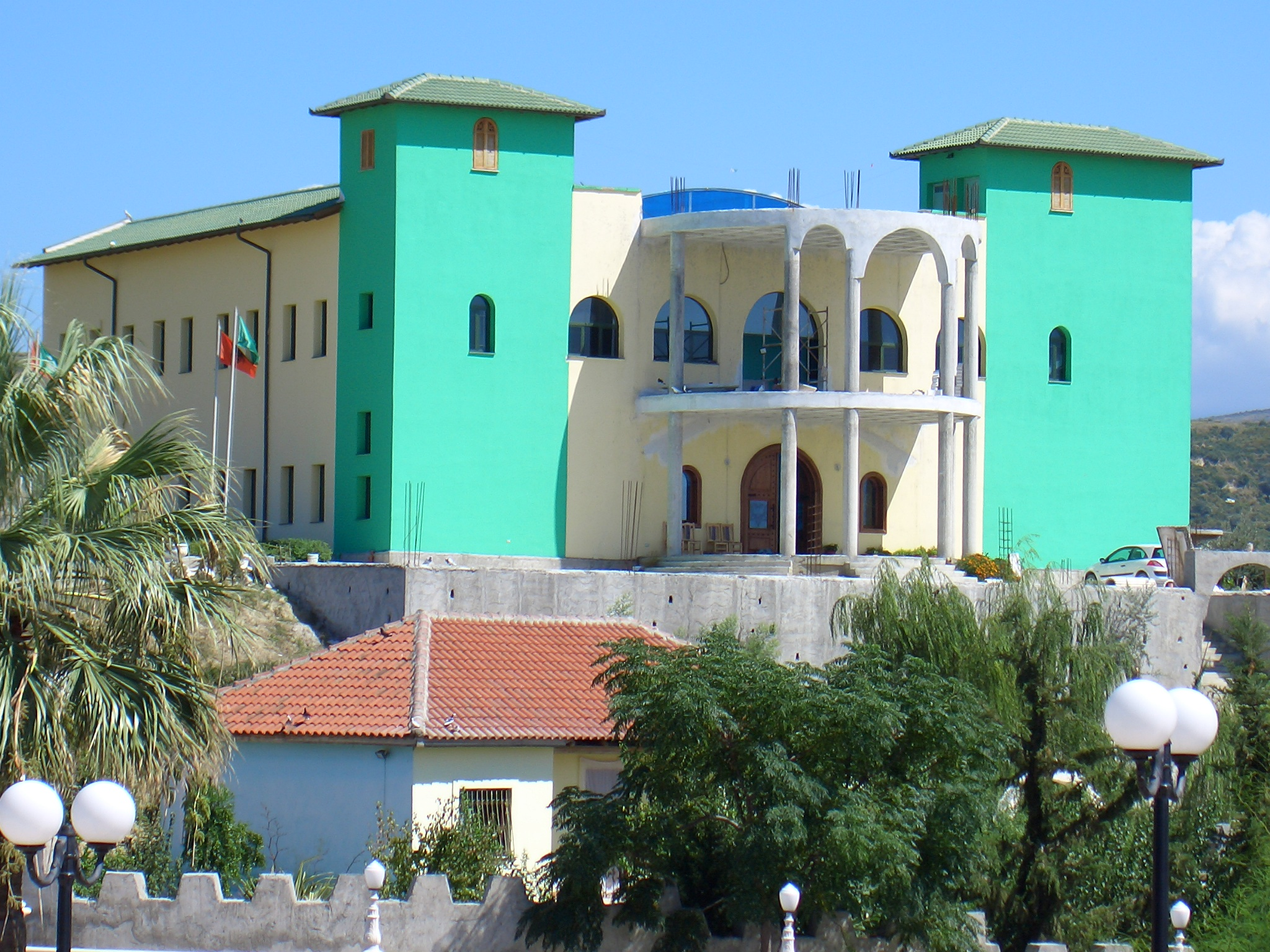 Neu errichtetes Bildungszentrum der Bektashi in Vlora (Albanien), Aufnahme August 2006